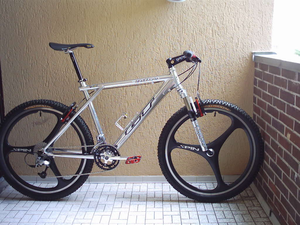 GT Zaskar LE 1999